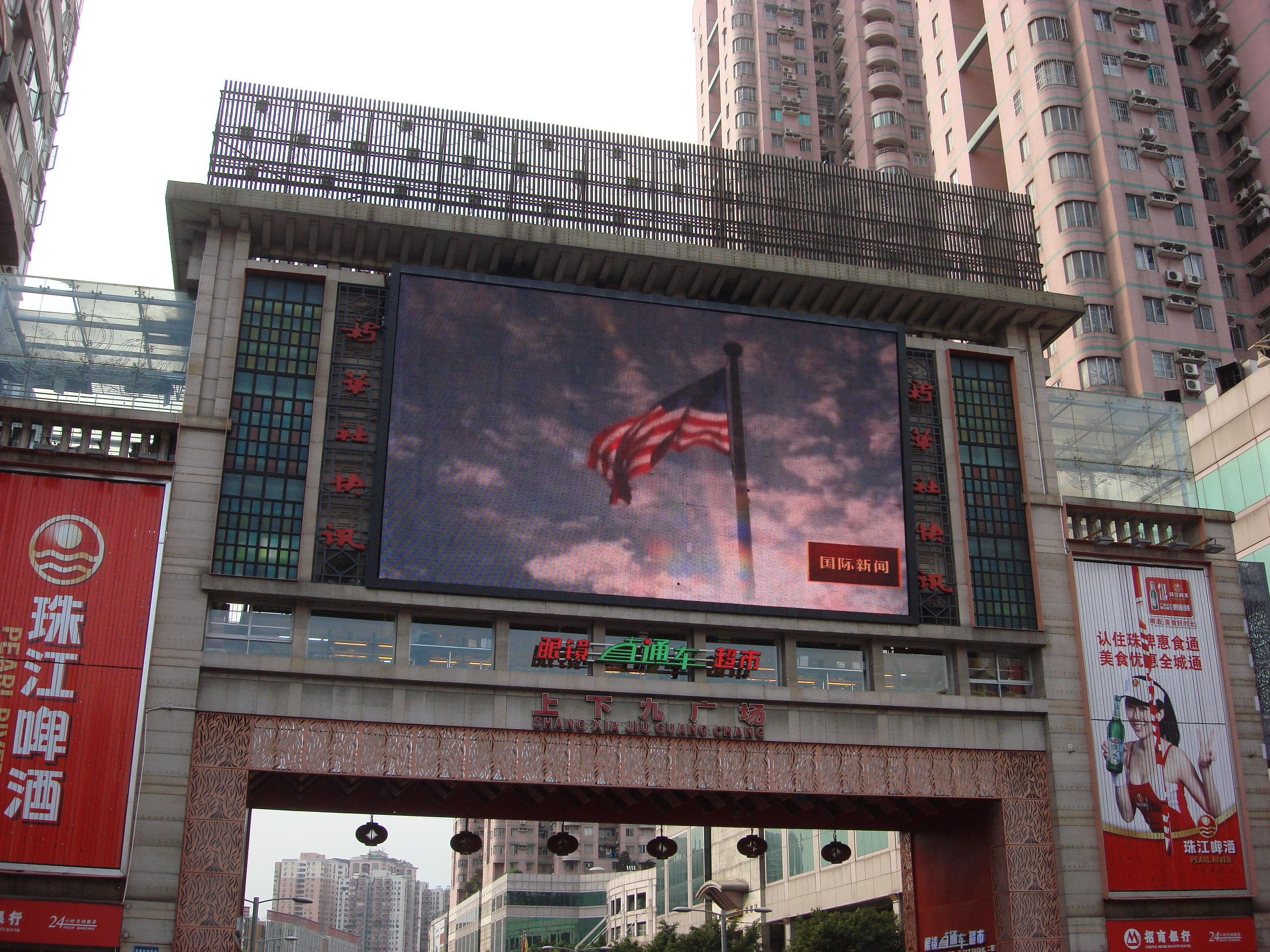 廣州市上下九廣場上的大型電視，專門播映北京的新華社快訊。上下九廣場中文字樣下方的英文是全漢語拼音（Shang Xia Jiu Guang Chang），並非真正的英文。